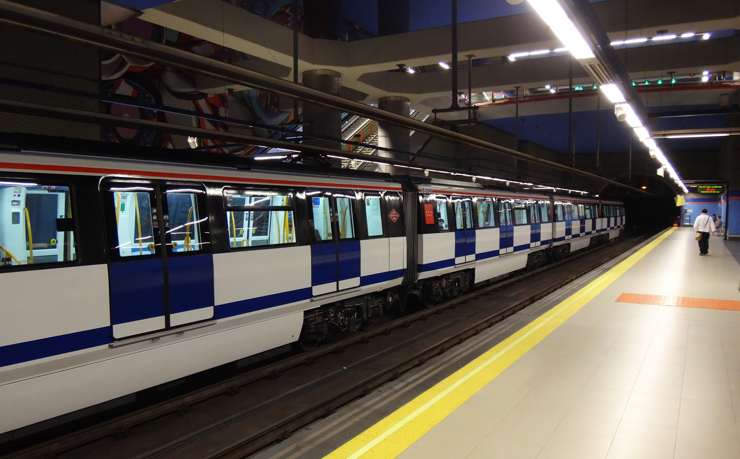 На станции метро Alsacia